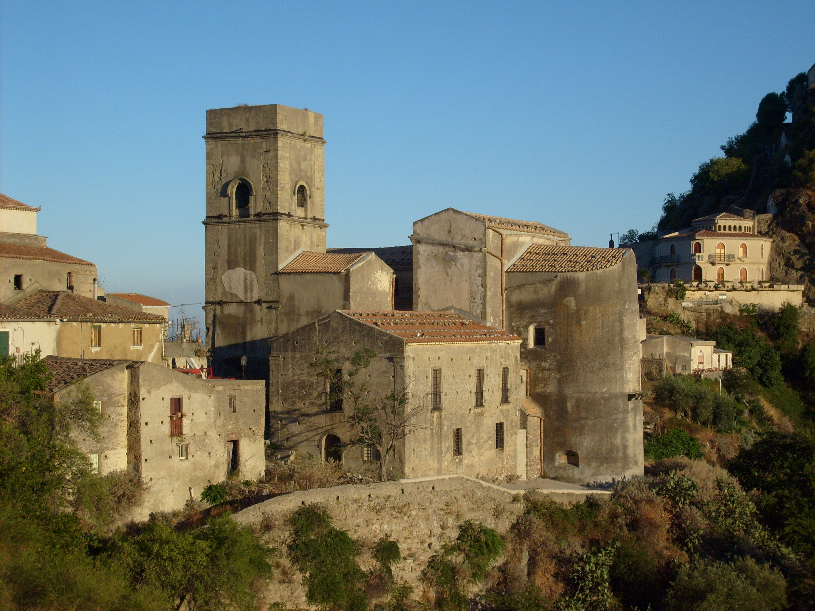 Retro Chiesa Madre